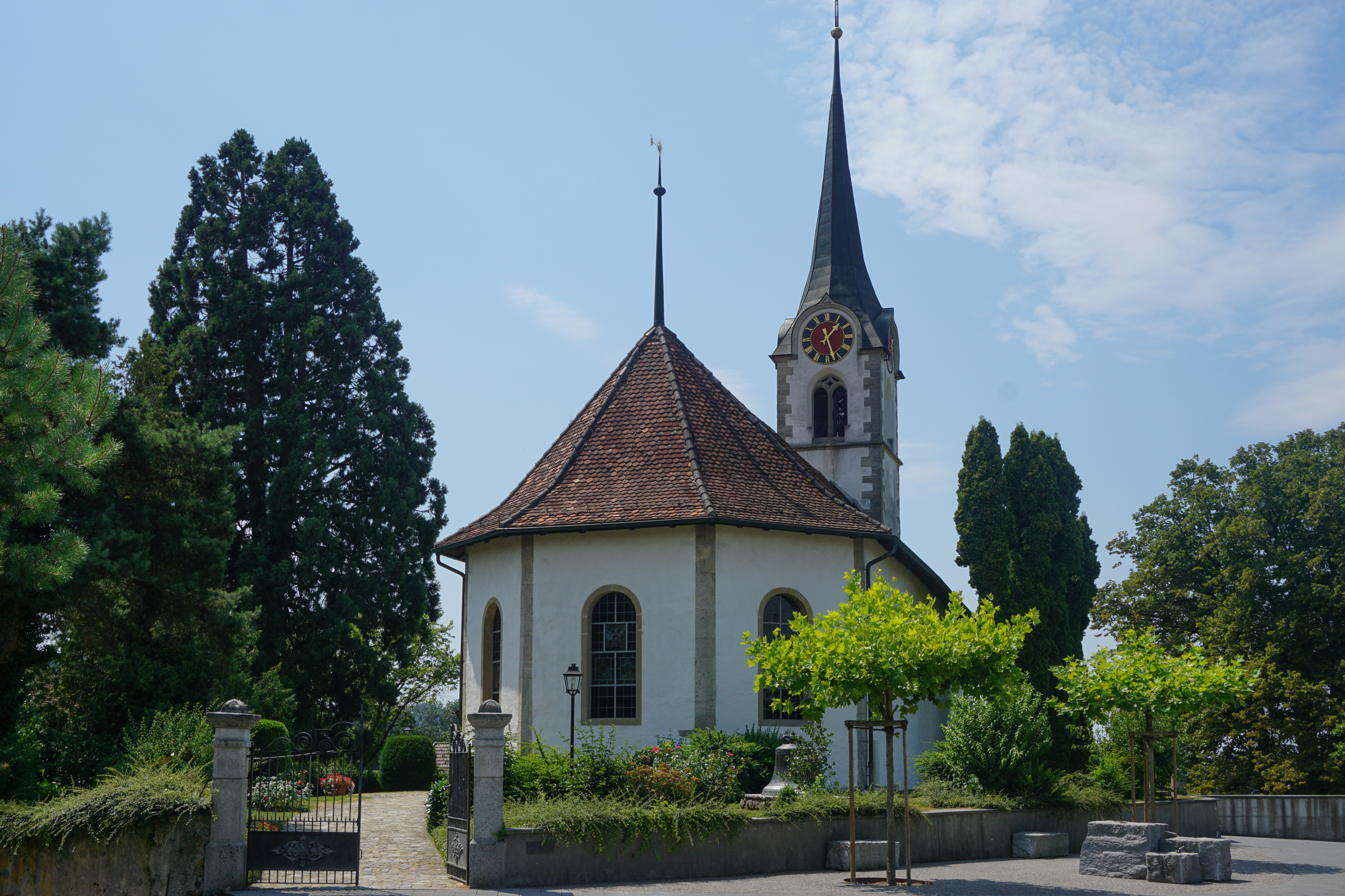 Kirche Seedorf bei Aarberg mit Eingang von Nordost